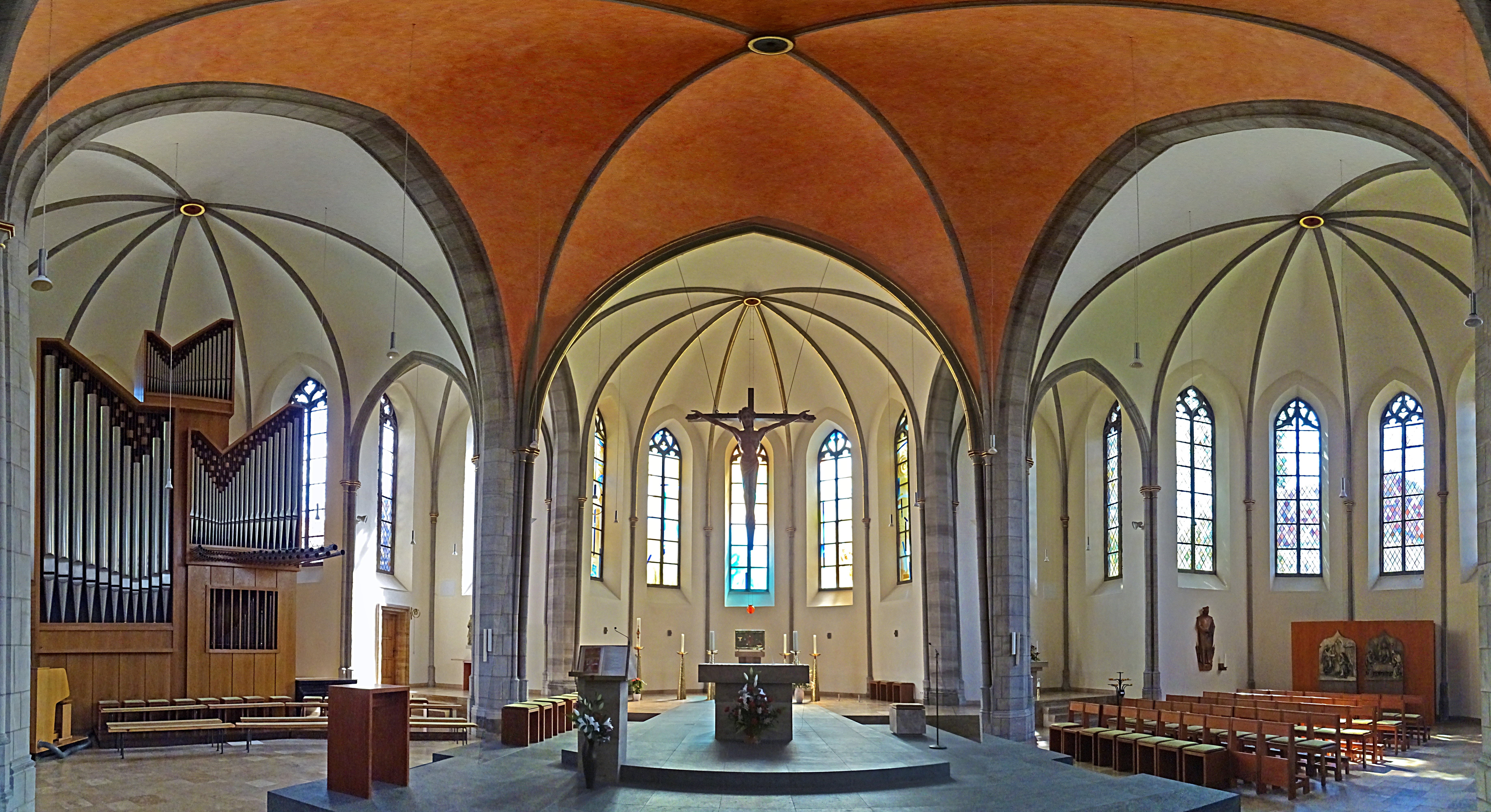 St. Josef (Mühlhausen), Panorama im Querhaus